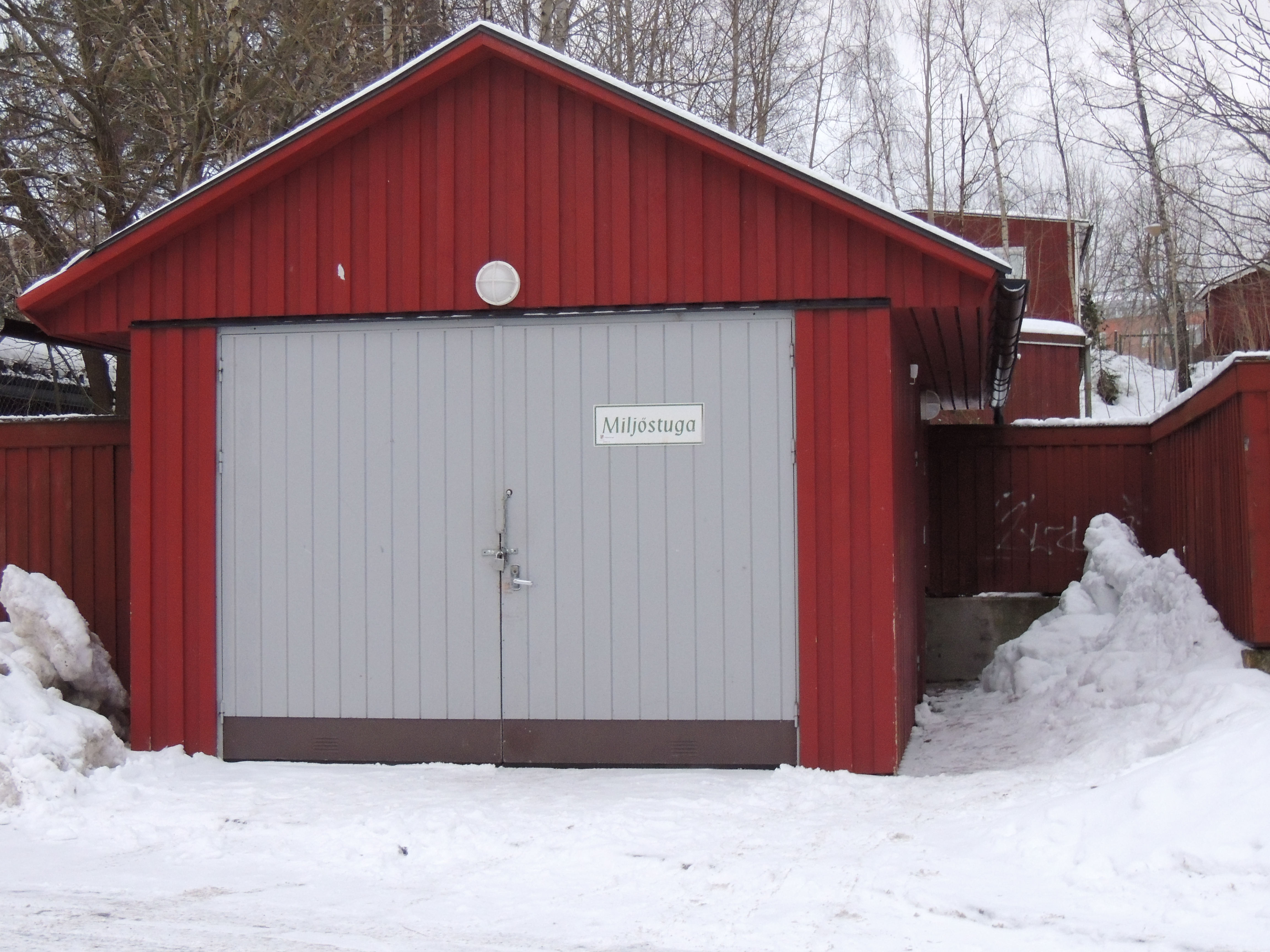 En miljöstuga.